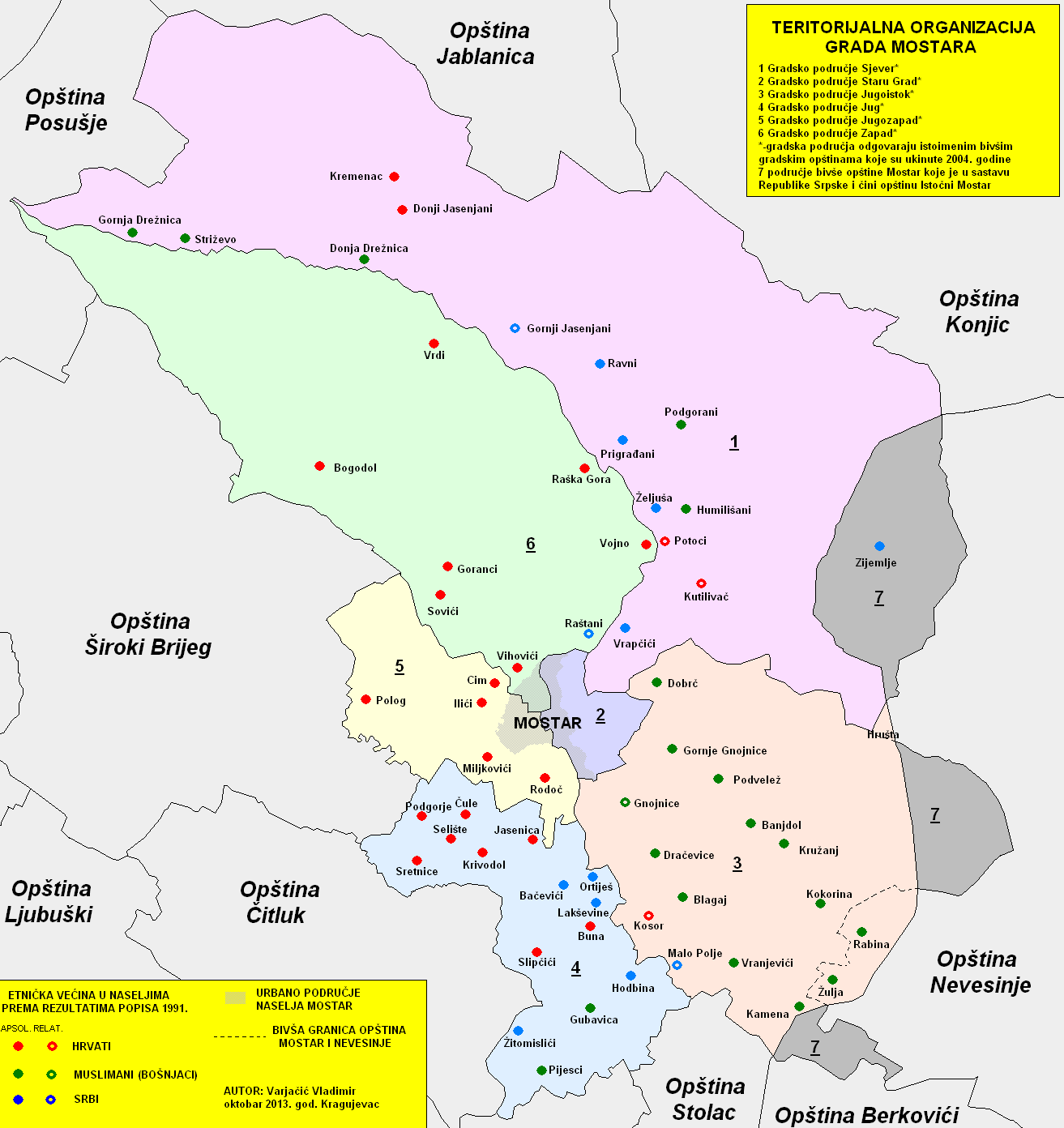 Organizacija Grada Mostara sa granicama gradskih područja i granicama bivših gradskih opština.